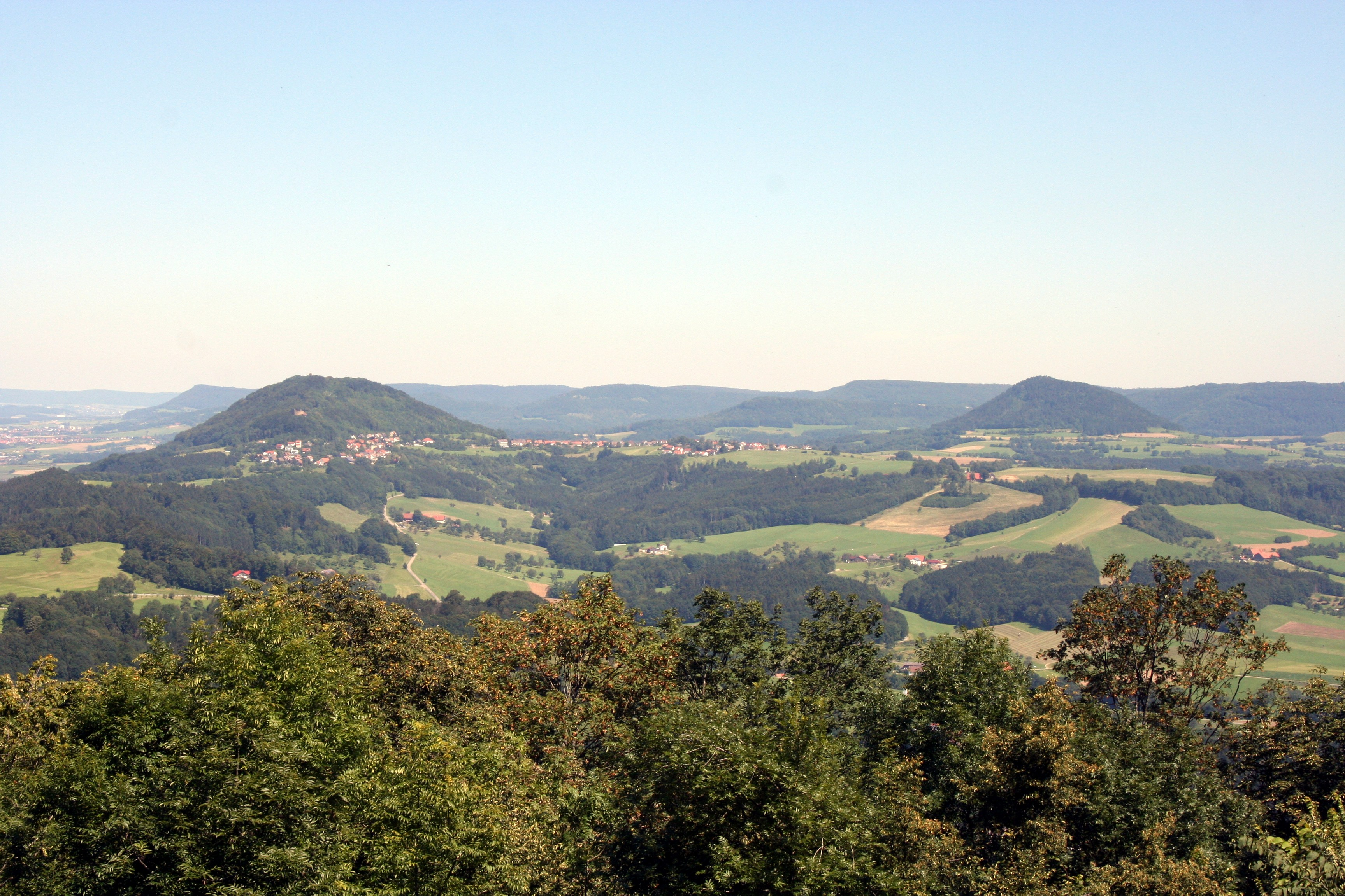 Der Rechberg (links) und der Stuifen (rechts) vom Hohenstaufen aus gesehen